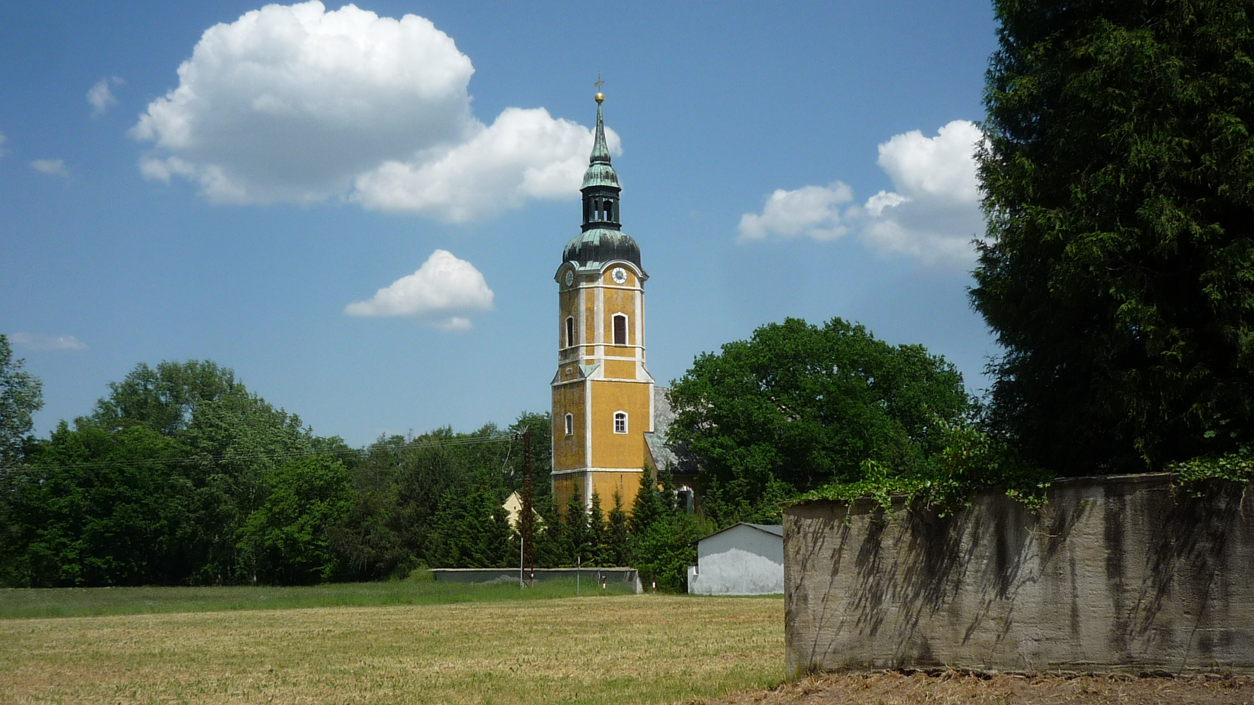 Barocker Turm der Ev. Luth. Kirche in Müglenz (Gemeinde Hohburg, Kreis Nordsachsen)- Höhe: 42 Meter